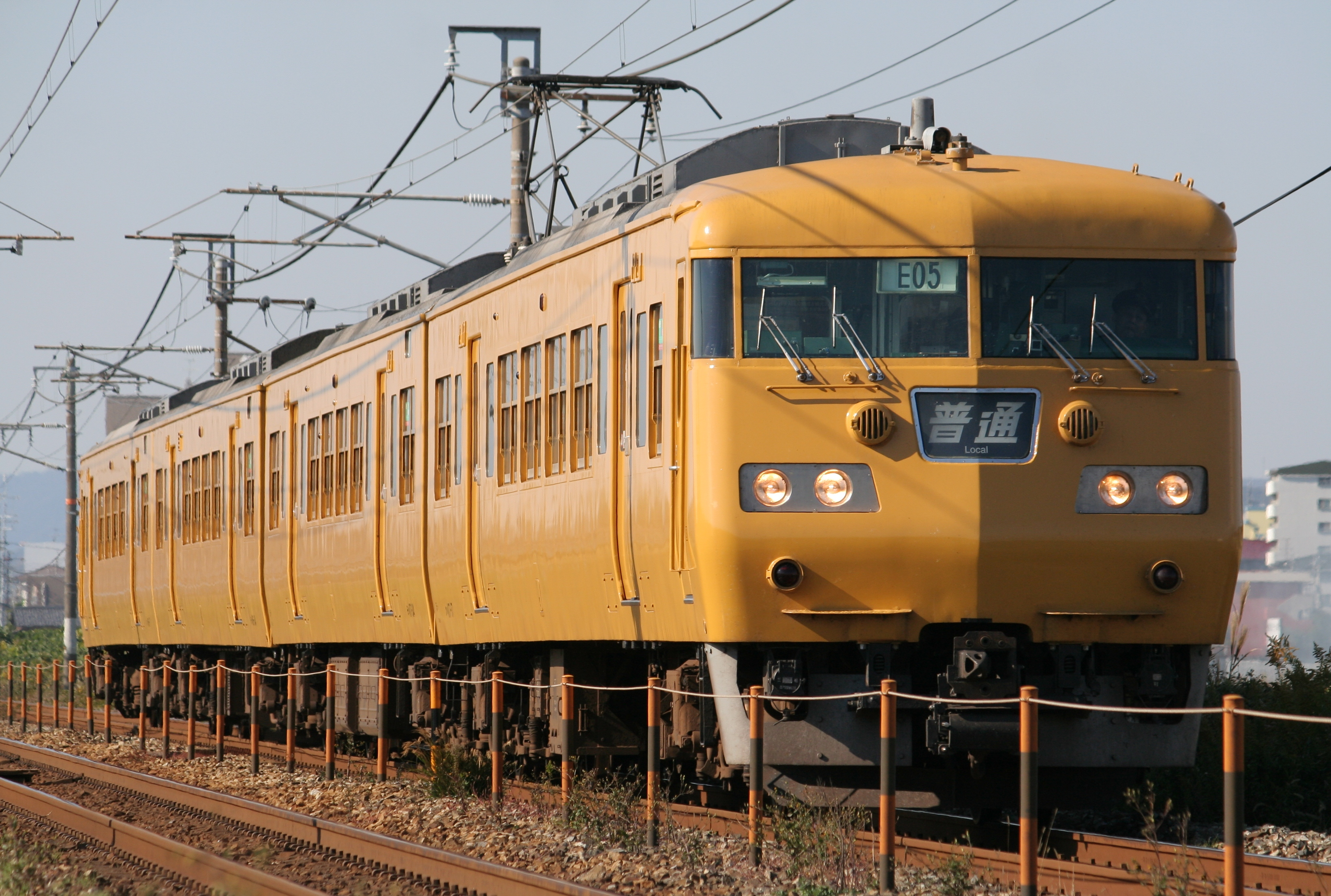 JR西日本117系電車E05編成 （黄色一色） 山陽本線、中庄 - 庭瀬